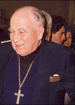 Cardenal Raúl Silva Henríquez